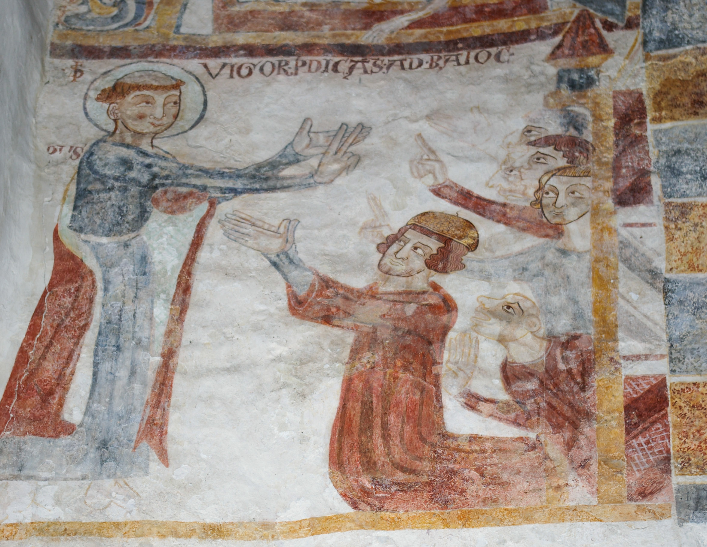 Fresques 1 Saint-Vigor de Neau (Mayenne)